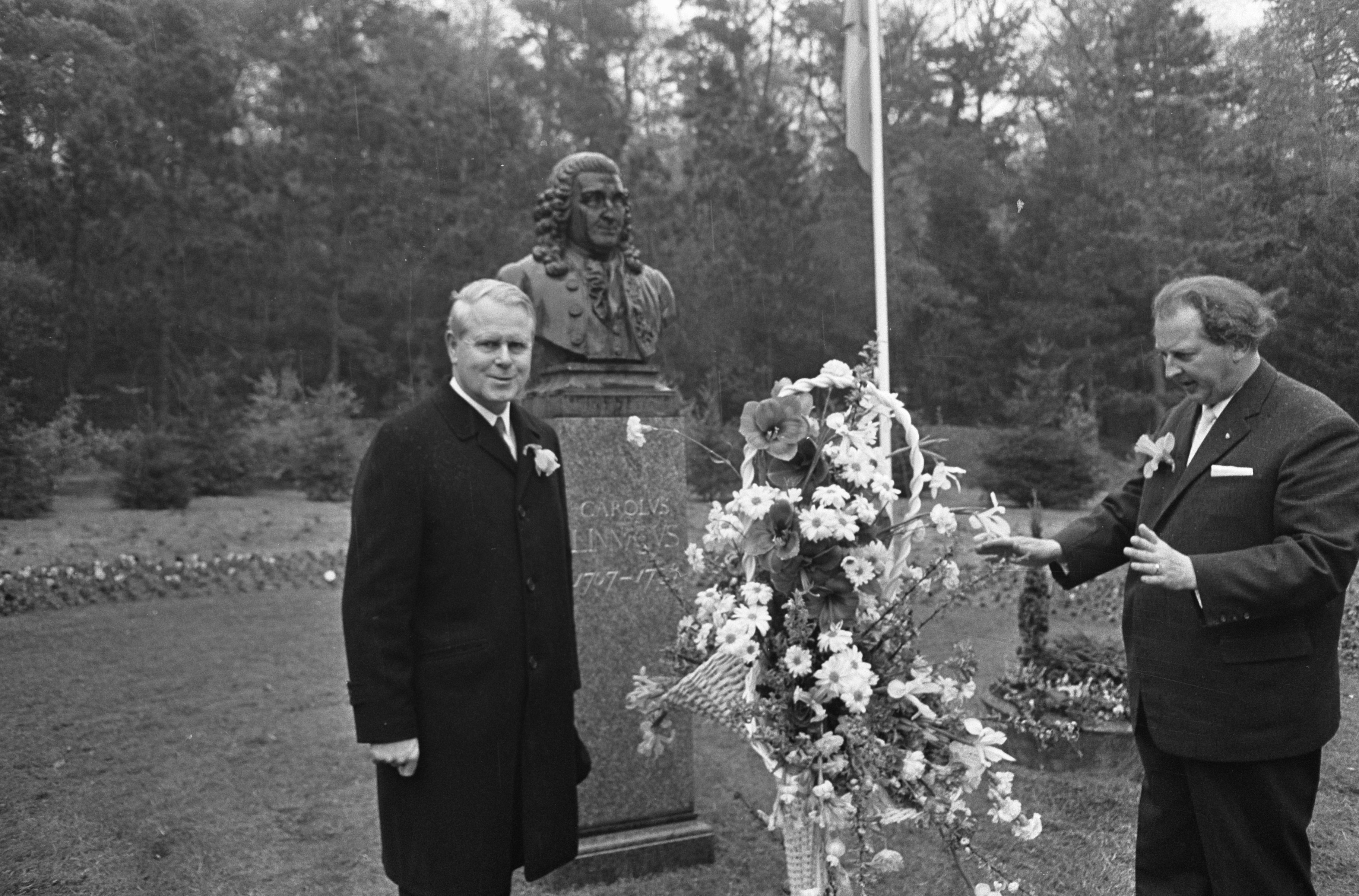 Collectie / Archief : Fotocollectie Anefo Reportage / Serie : [ onbekend ] Beschrijving : Opening Linnaueshof door Ambassadeur van Zweden, mr. Jens Malling Datum : 27 april 1966 Trefwoorden : Openingen, ambassadeurs Fotograaf : Kroon, Ron / Anefo Auteursrechthebbende : Nationaal Archief Materiaalsoort : Negatief (zwart/wit) Nummer archiefinventaris : bekijk toegang 2.24.01.05 Bestanddeelnummer : 919-0804